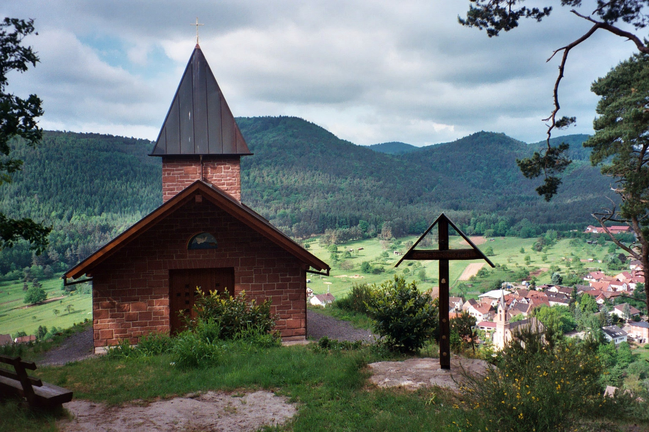 Die Friedenskapelle mit Blick auf den Ort Birkenhördt